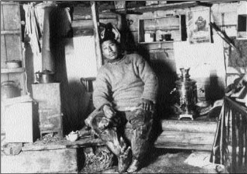 Николай Куртах в юрте Воллосовича. О. Котельный, Новосибирские о-ва